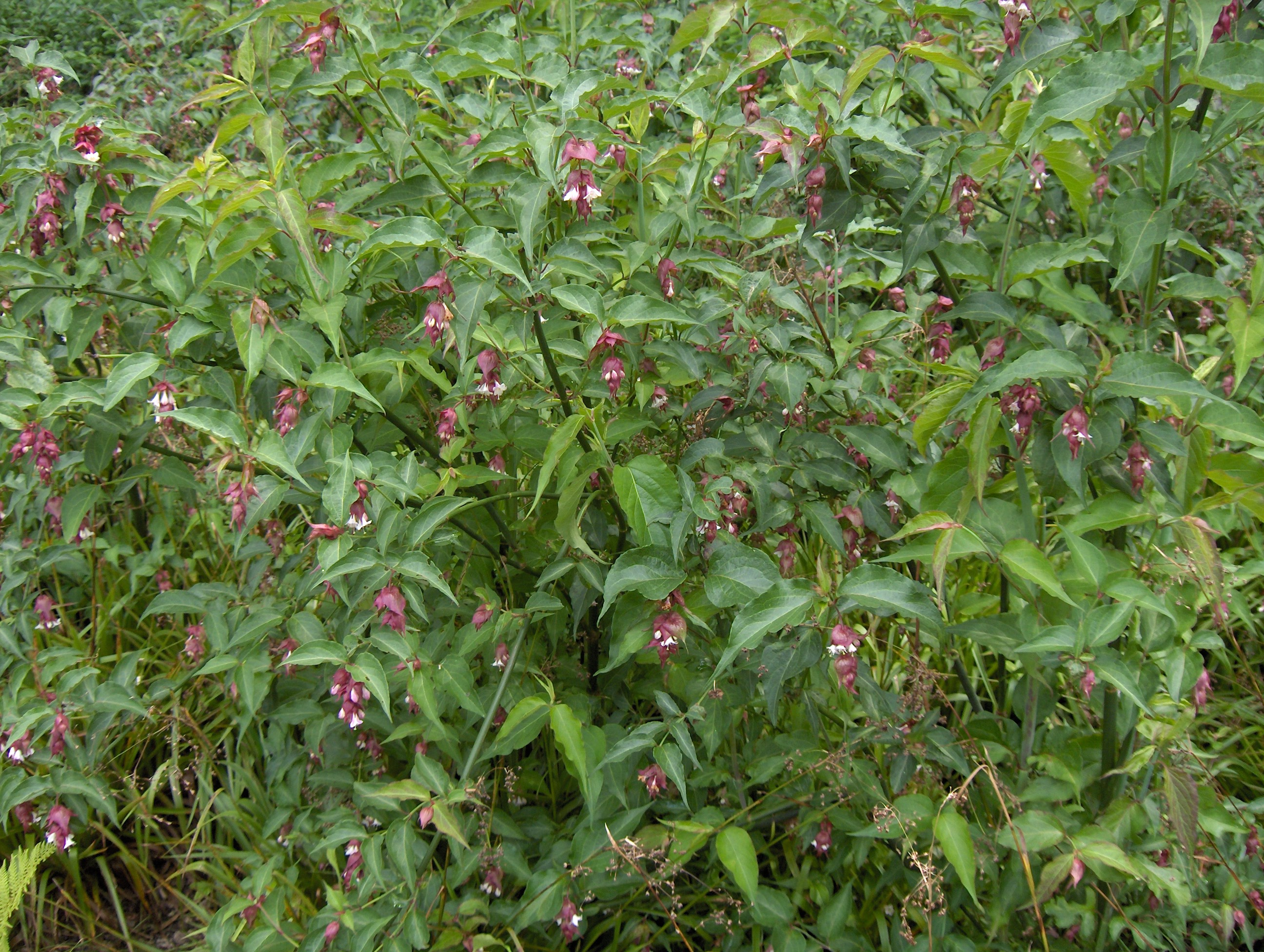 Leycesteria formosa